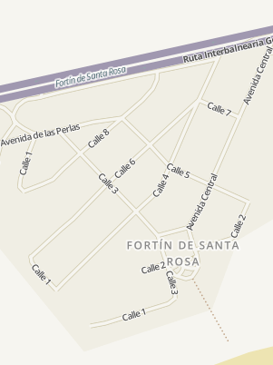 Plano de Fortín con nombres de calles. This map may be incomplete, and may contain errors. Don't rely solely on it for navigation.